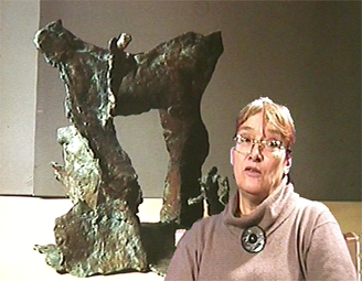 Portrait de Lisbeth Delisle